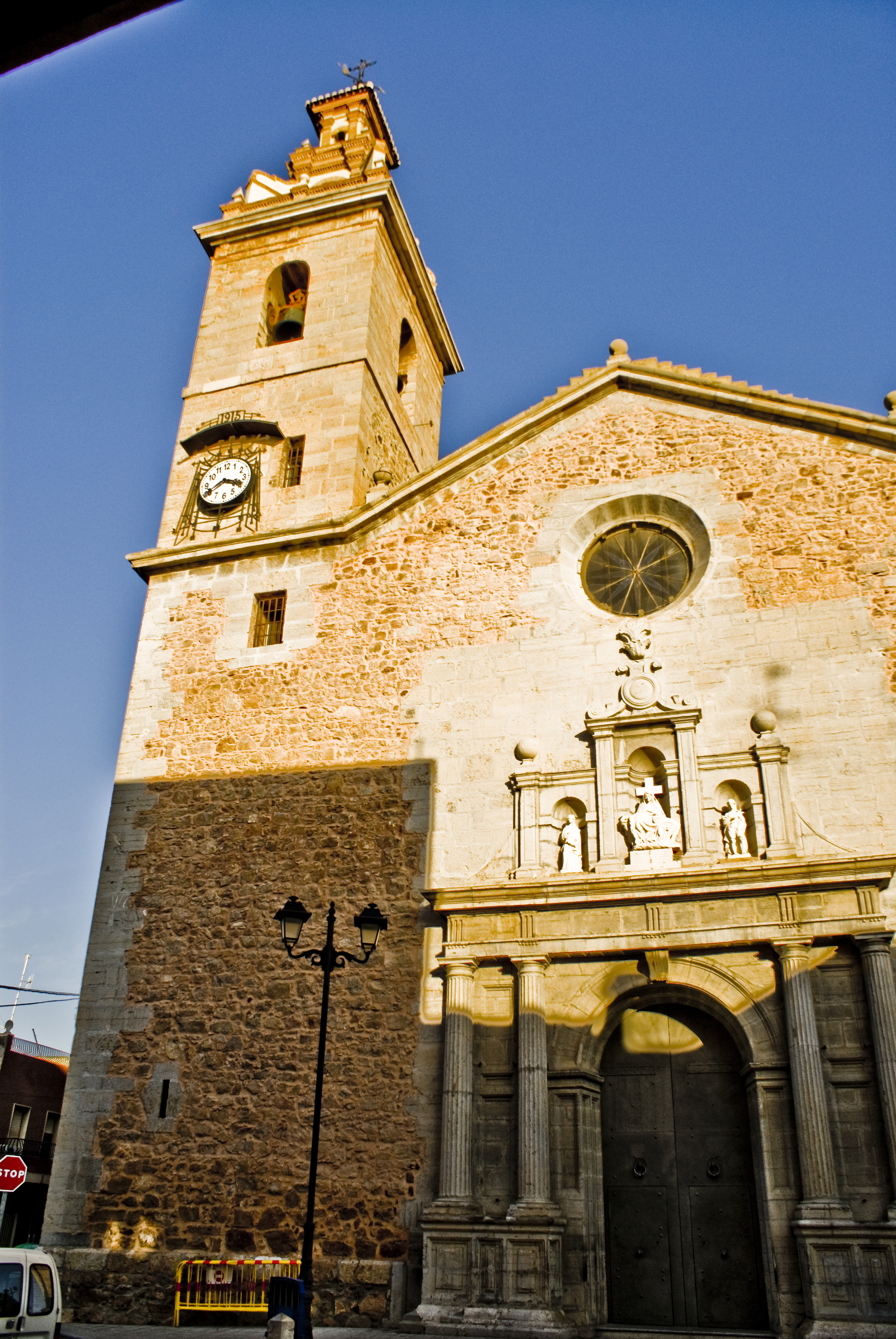 Façana principal de l'esglesia dels Sants Joans